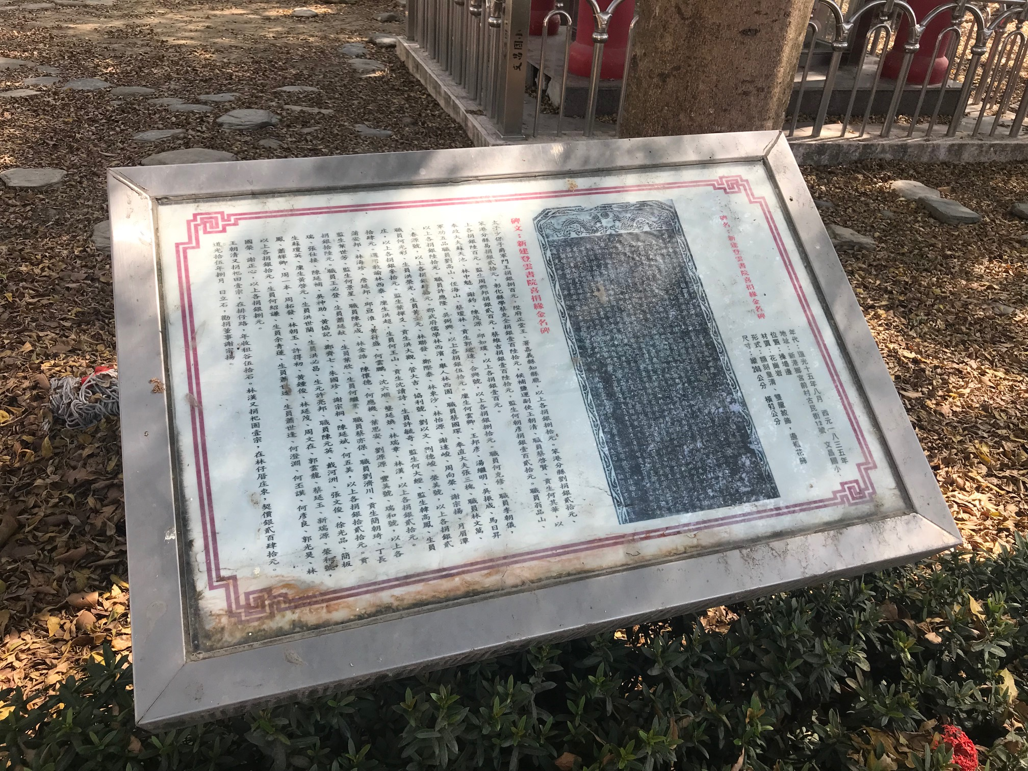 中文（台灣）: 新建登雲書院喜捐緣金名碑說明牌